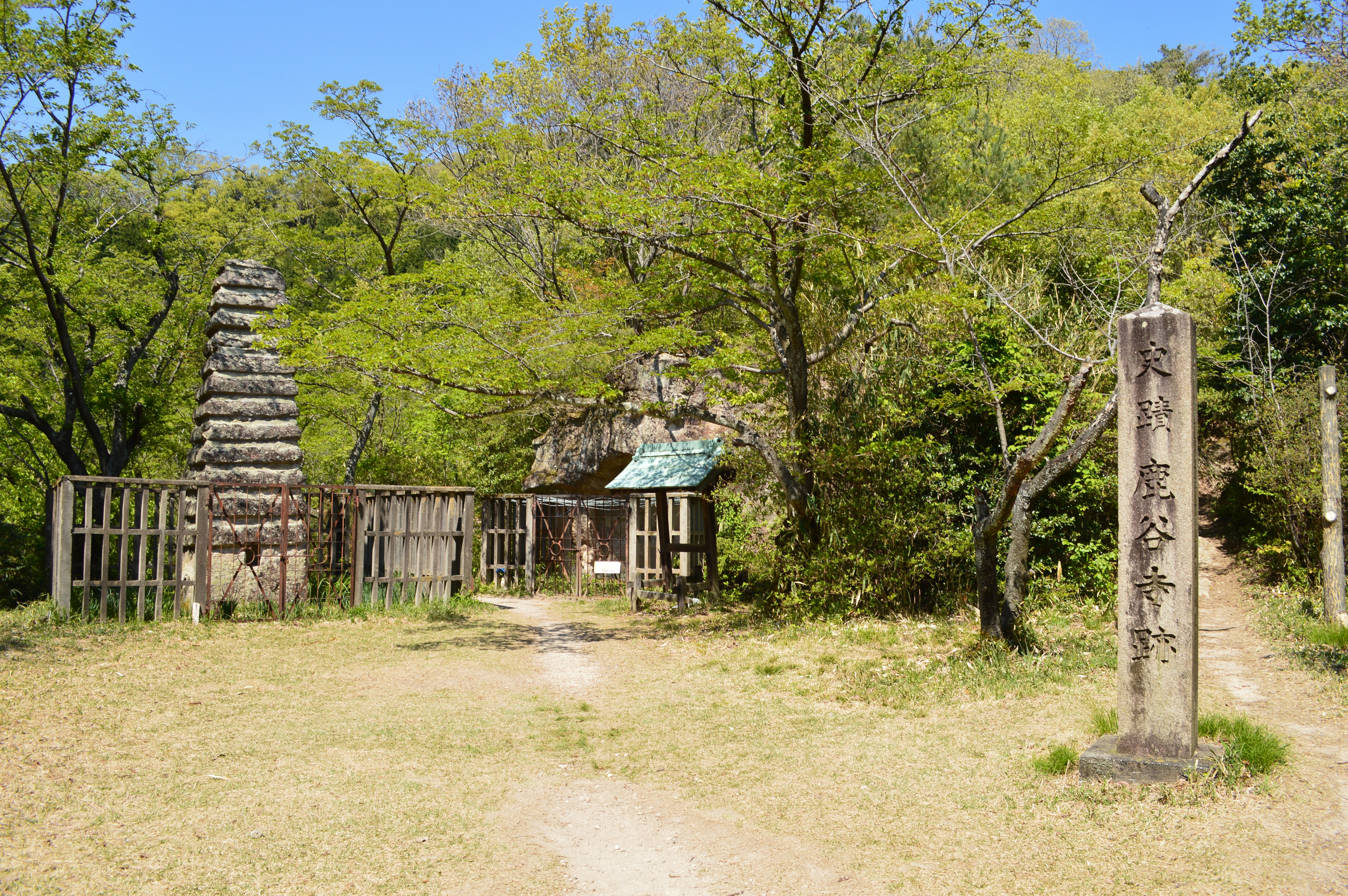 鹿谷寺跡 概観